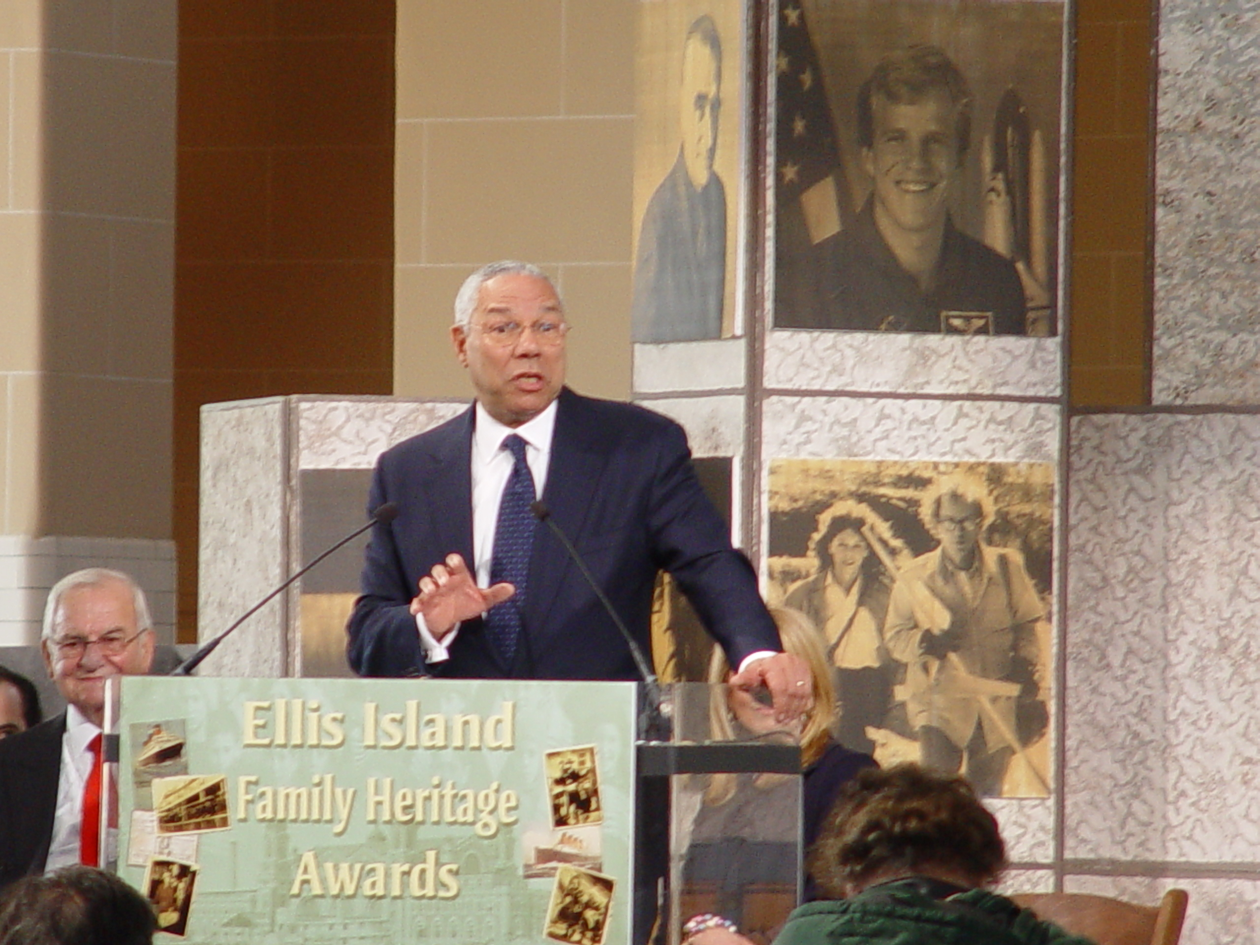 Fotografiert von Martin Dürrschnabel Colin Powell bei der Verleihung des Ellis Island Family Heritage Award.